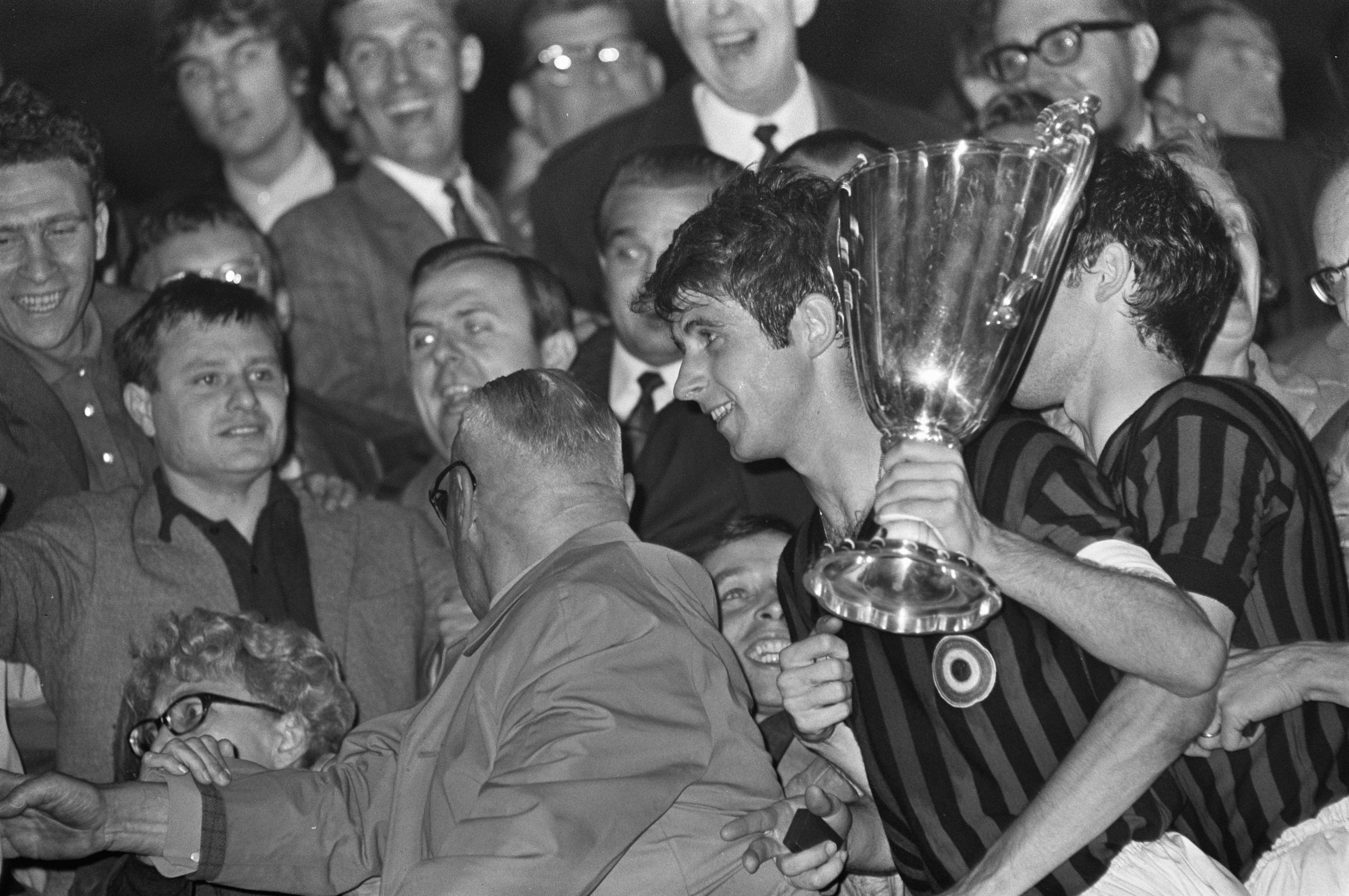 Collectie / Archief : Fotocollectie Anefo Reportage / Serie : [ onbekend ] Beschrijving : Finale Europa Cup II AC Milan tegen HSV Hamburg 2-0. Spelers van Milan maken rondje over veld. Aanvoerder Gianni Rivera met de cup Datum : 23 mei 1968 Locatie : Rotterdam Trefwoorden : voetbal, voetballers Persoonsnaam : Rivera, Gianni Instellingsnaam : AC Milaan Fotograaf : Kroon, Ron / Anefo Auteursrechthebbende : Nationaal Archief Materiaalsoort : Negatief (zwart/wit) Nummer archiefinventaris : bekijk toegang 2.24.01.05 Bestanddeelnummer : 921-3776